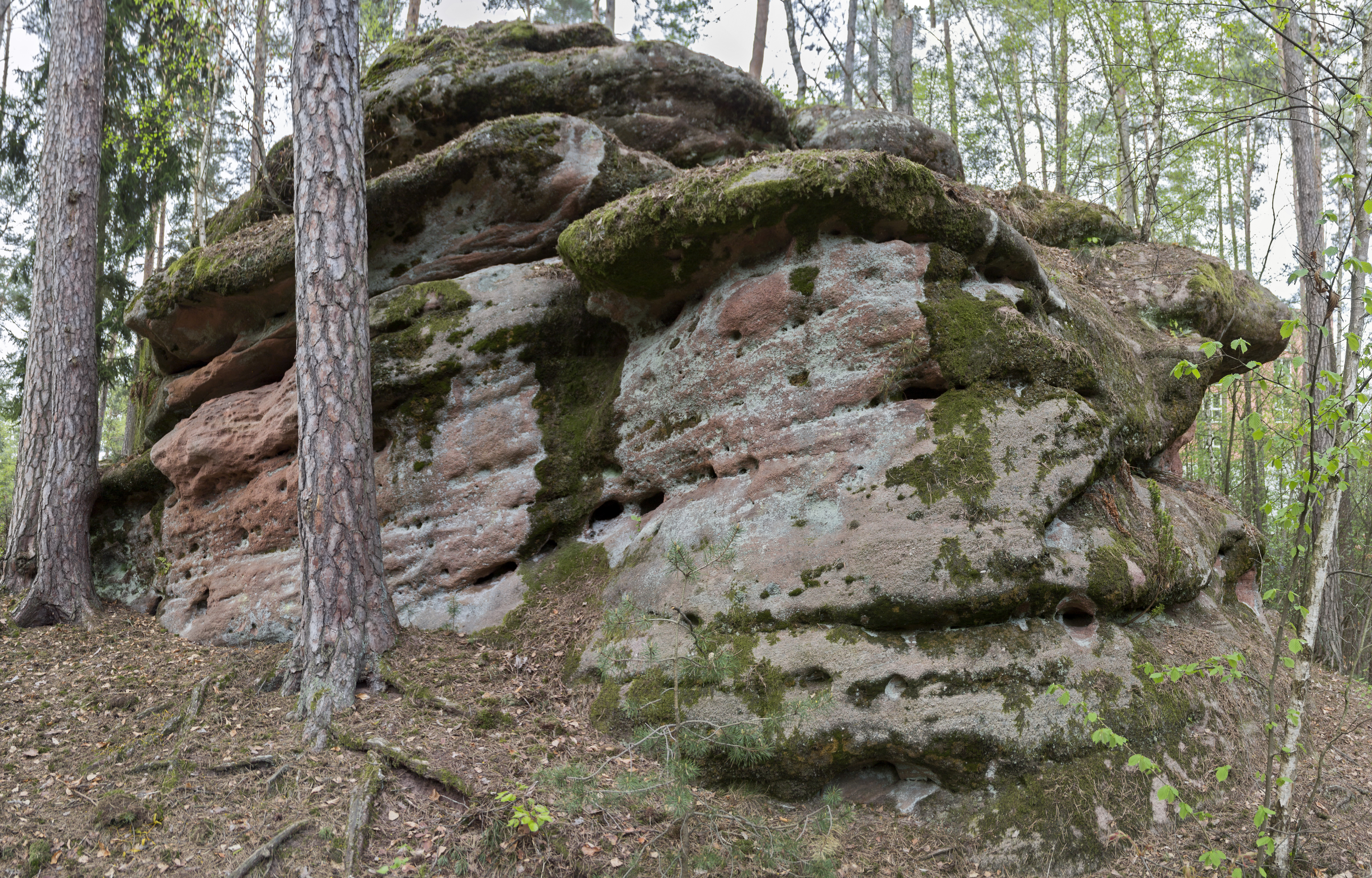 Burgsandsteinfelsen, Rummelsberg, Schwarzenbruck, Geotop